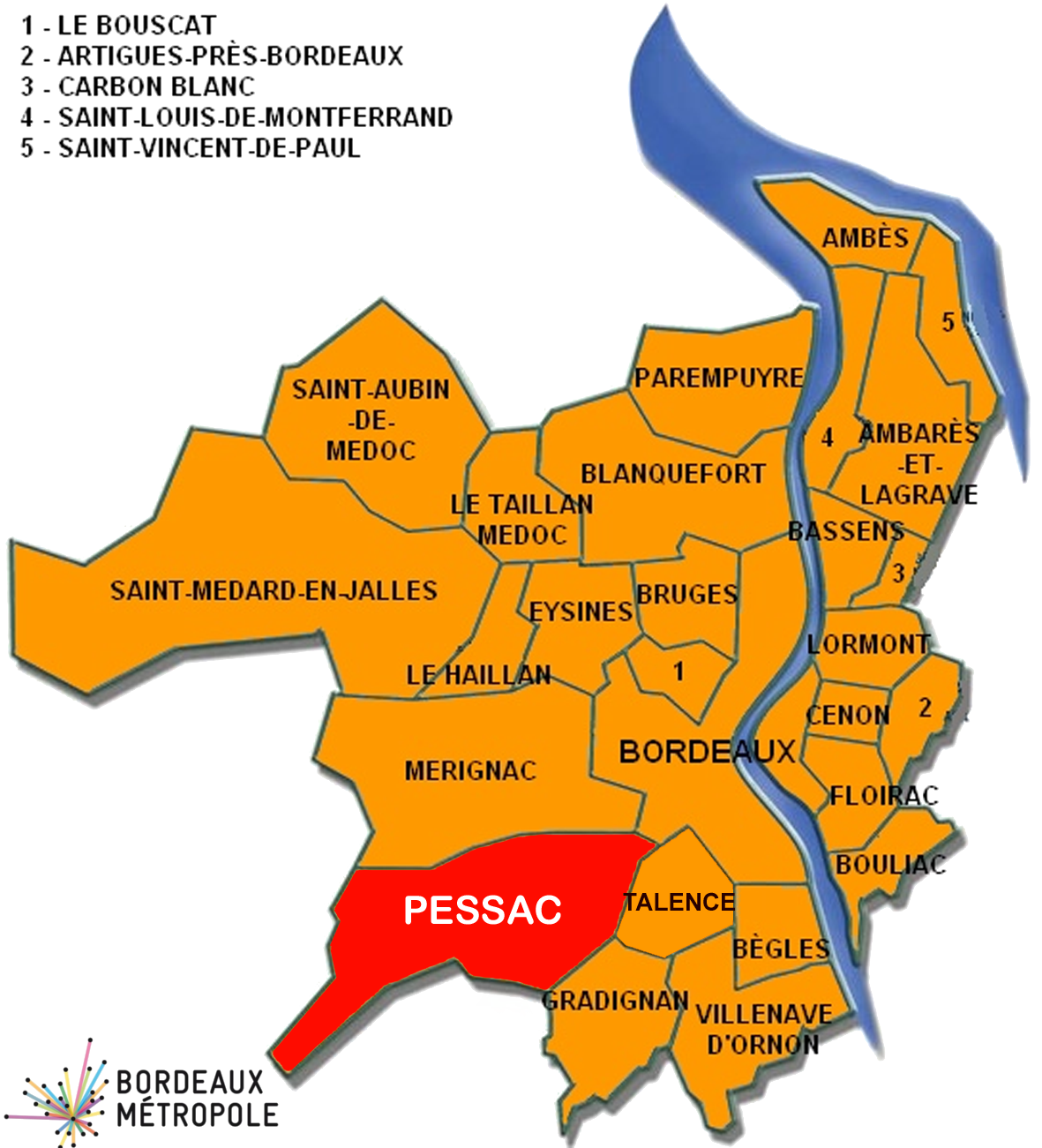 Situation de Pessac au sein de la Communauté urbaine de Bordeaux (CUB) / Location of Pessac in the Urban Community of Bordeaux (CUB)